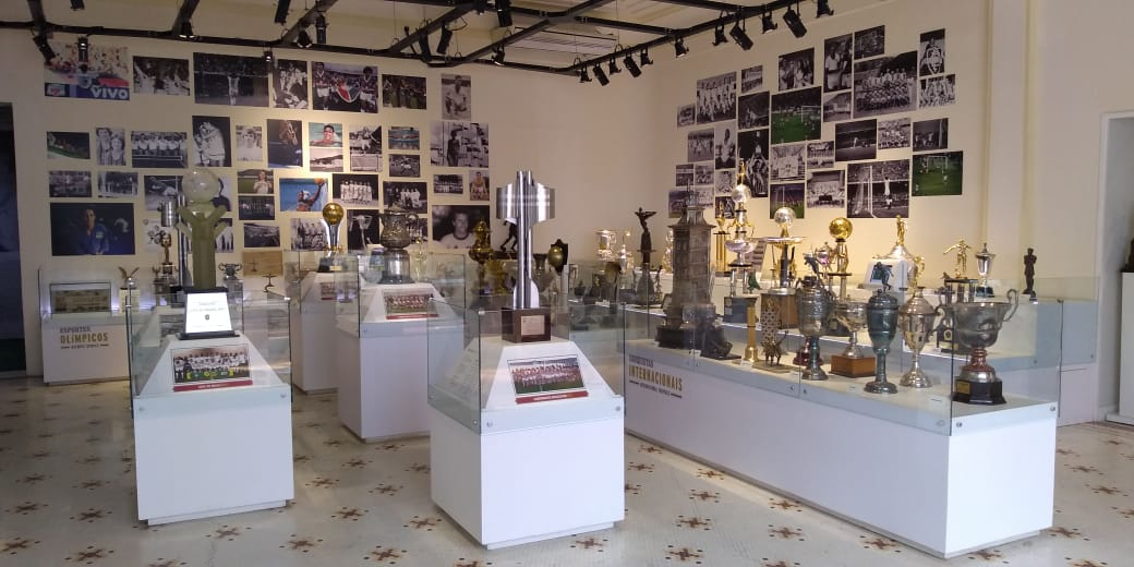 Sala de Troféus do Fluminense Football Club.